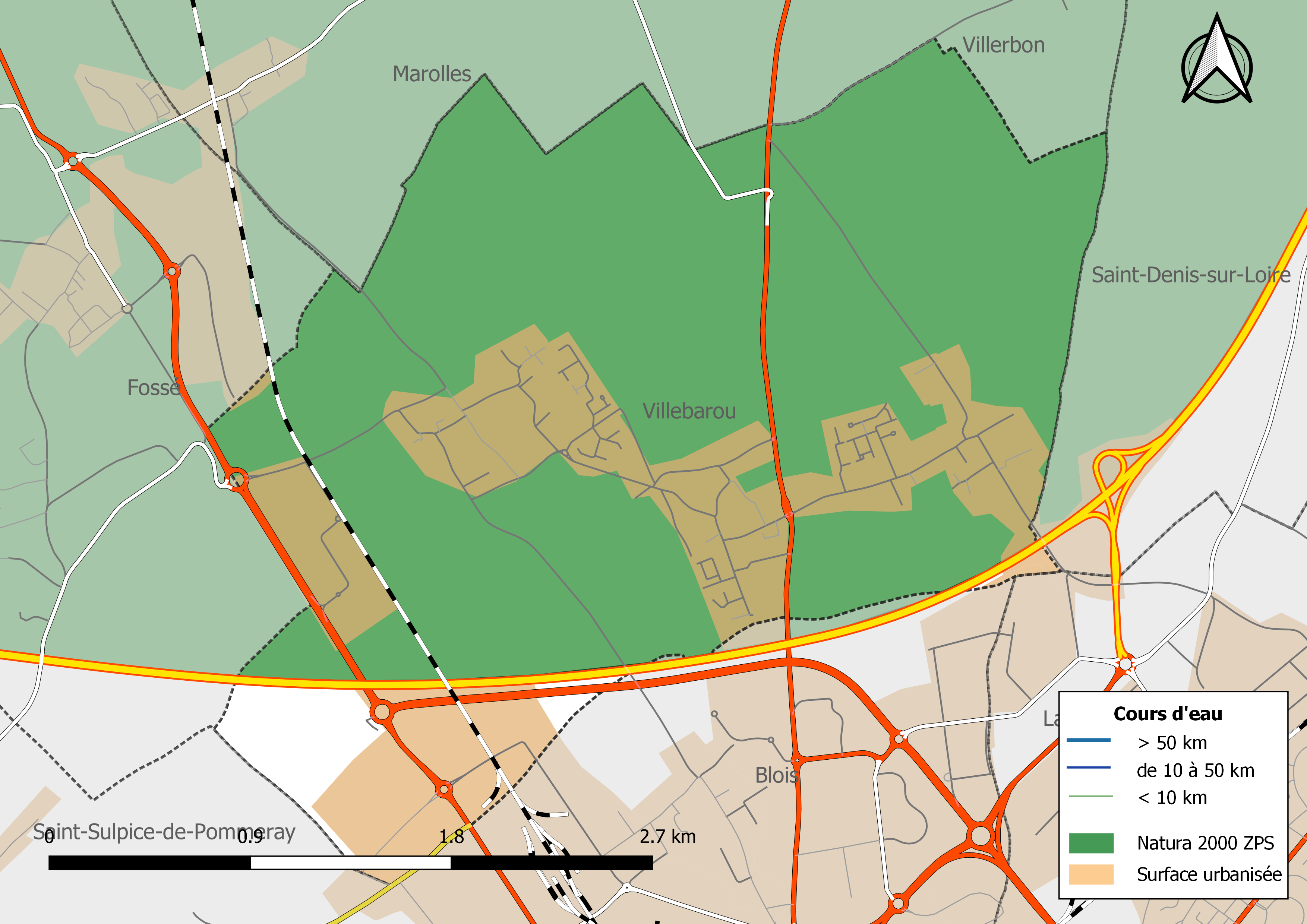 Carte du site Natura 2000 de type ZPS de la commune de Villebarou (France).